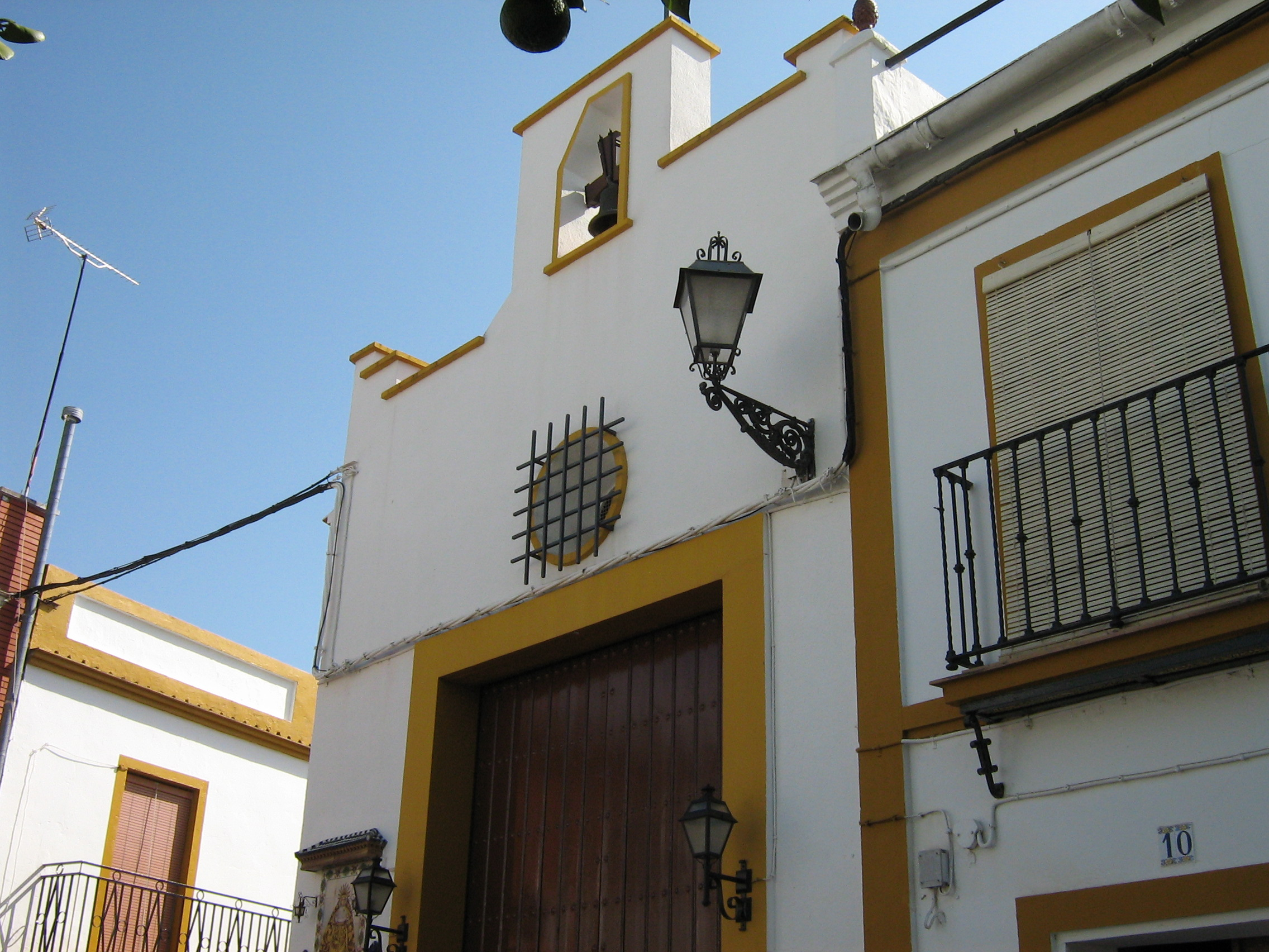 CAPILLA DONDE SE ESNCUENTRA EL CRISTO DE LA MISERICORDIA Y LA VIRGEN DE LOS DOLORES PATRONA Y ALCALDESA DE LA RINCONADA.